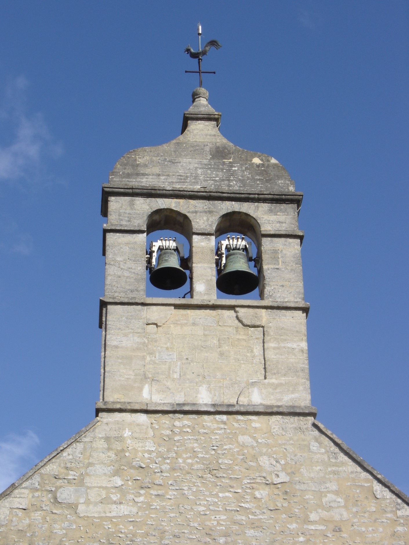 clocher de l'église de Cresserons surmonté d'une girouette